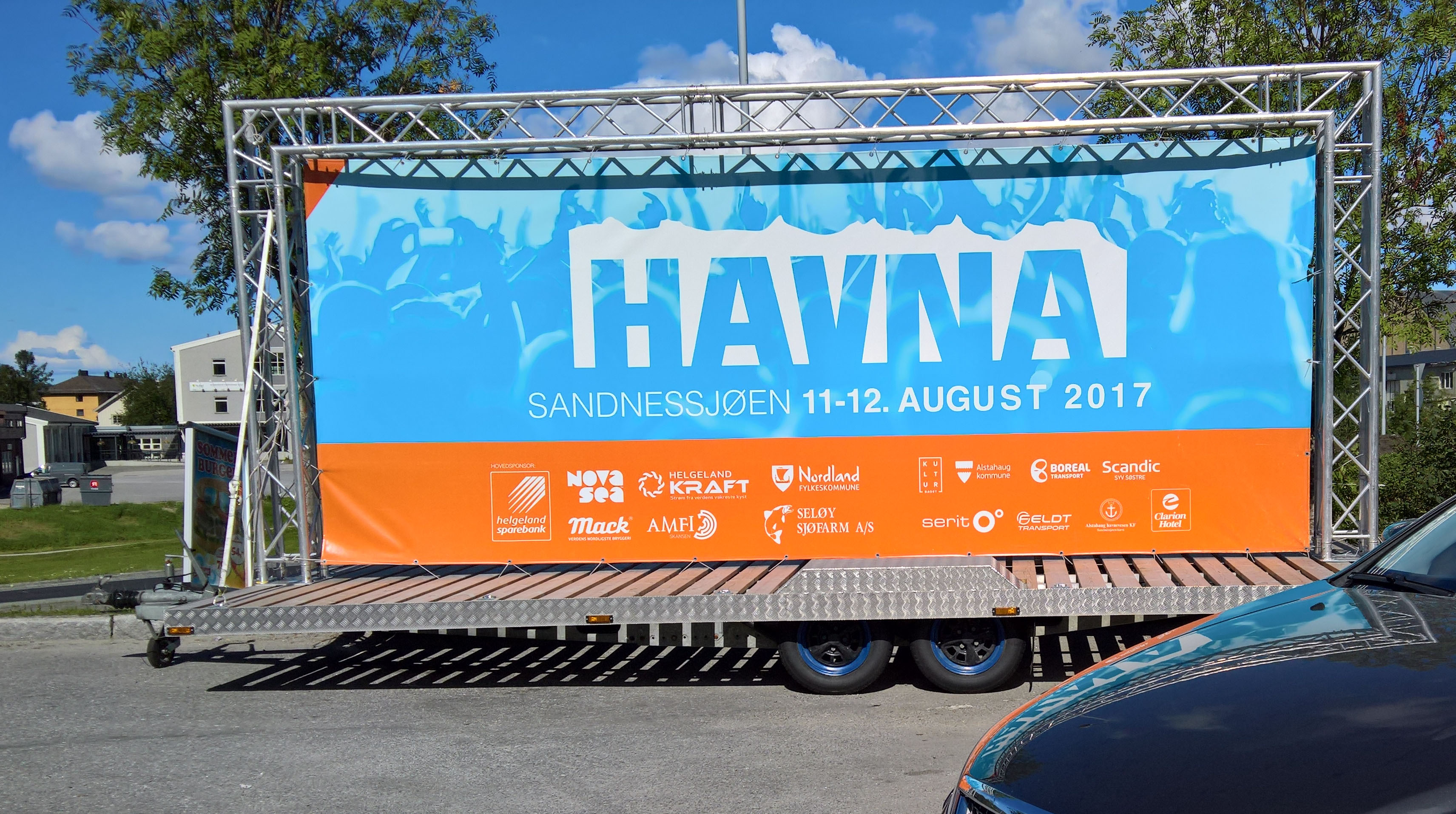 Reklamering for Havnafestivalen 2017 ved Circle K (Stigerplatåveien 2), Mo i Rana.